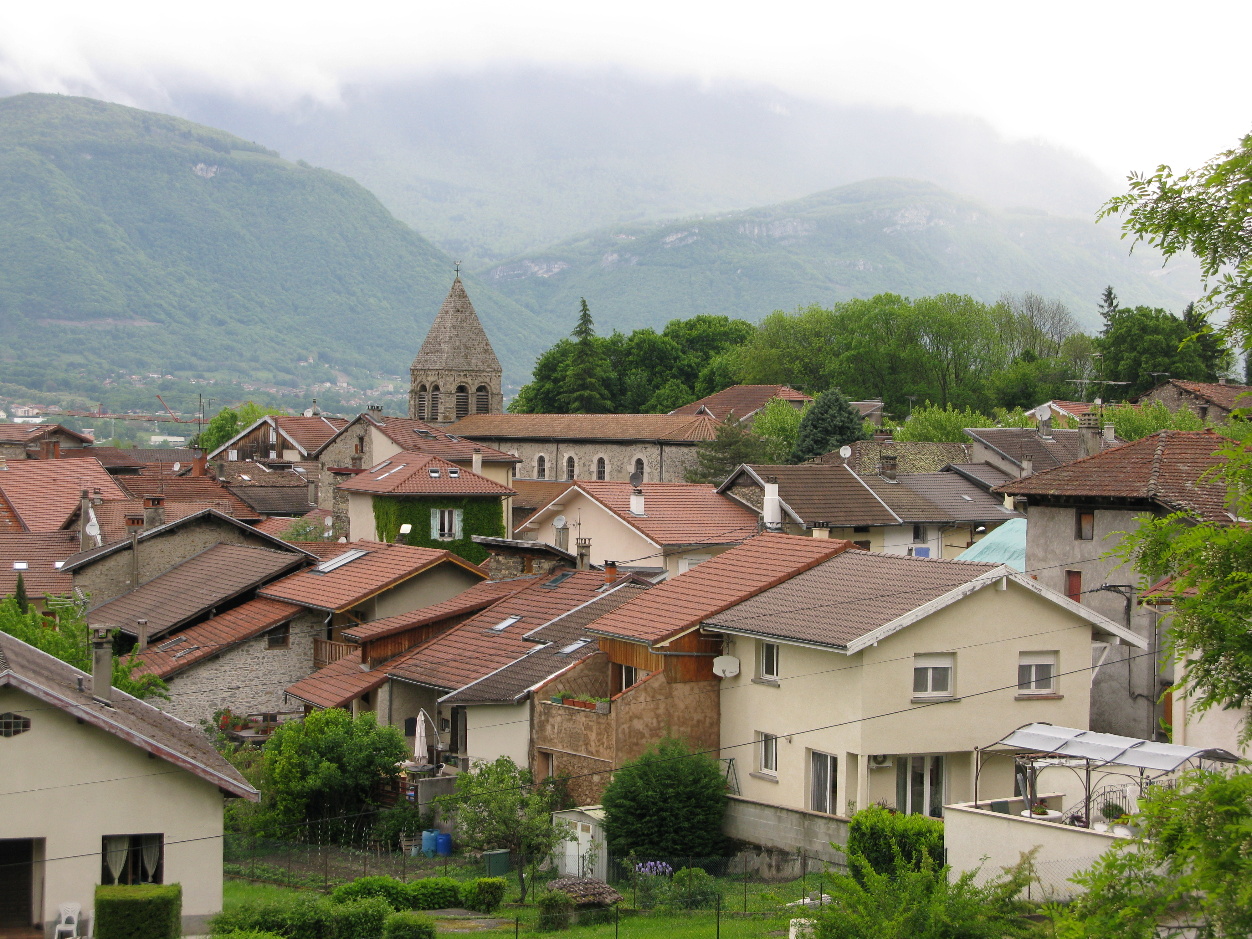 Le Village de Goncelin (38), vue d'ensemble depuis les contreforts de Belledonne